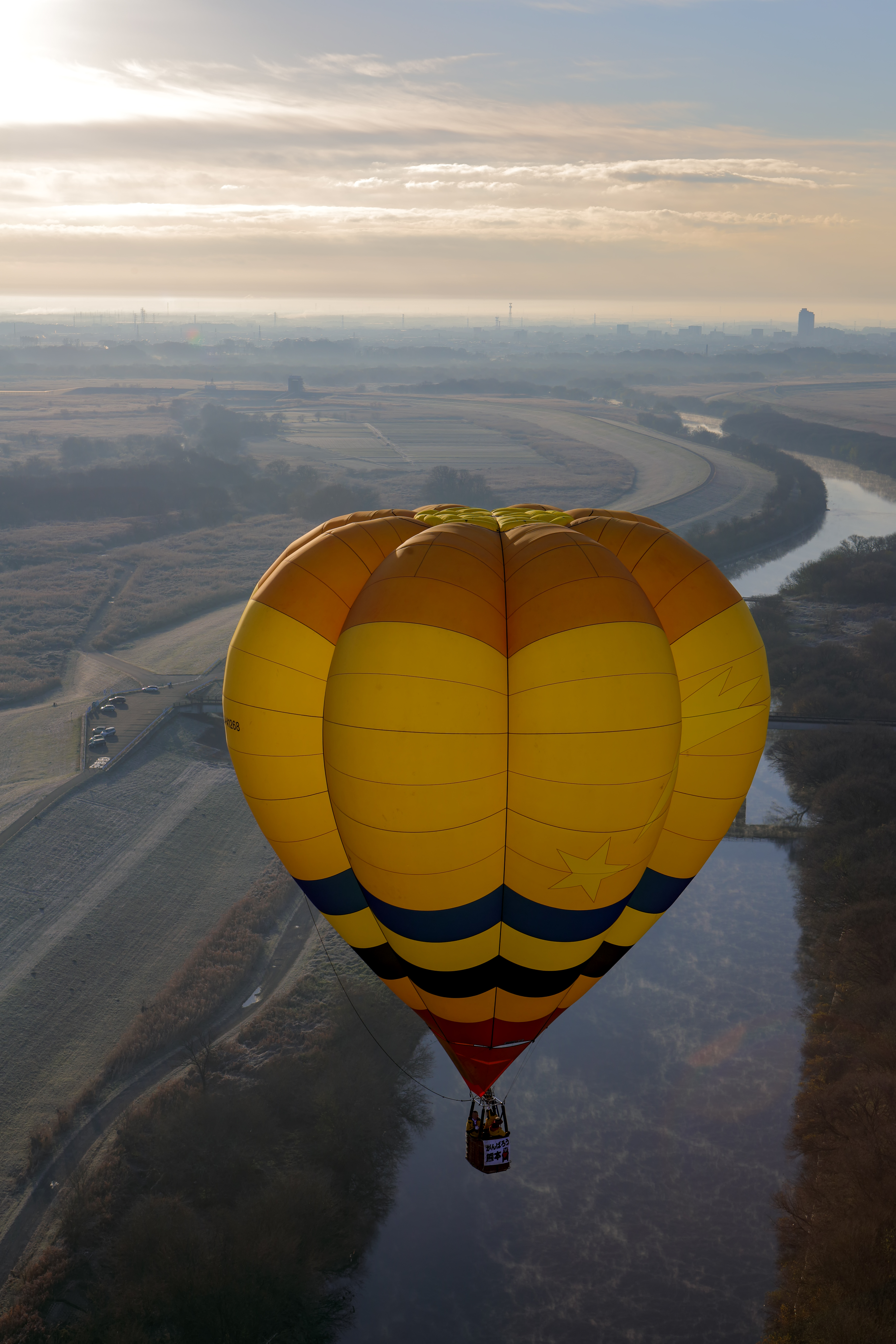 渡良瀬遊水池で撮影された熱気球